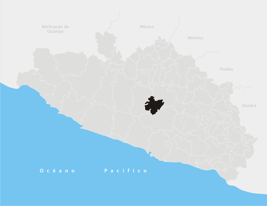 Leonardo Bravo en el estado de Guerrero (México)